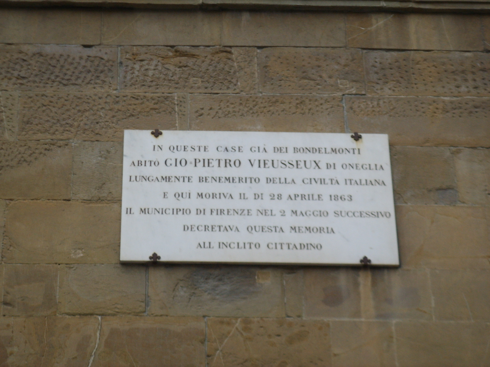 Palazzo buondelmonti, targa giovanni pietro viesseux